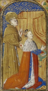 Le duc François Ier de Bretagne en prière, sous le patronage de François d'Assise. Détail (découpe+rotation+correction de distorsion)